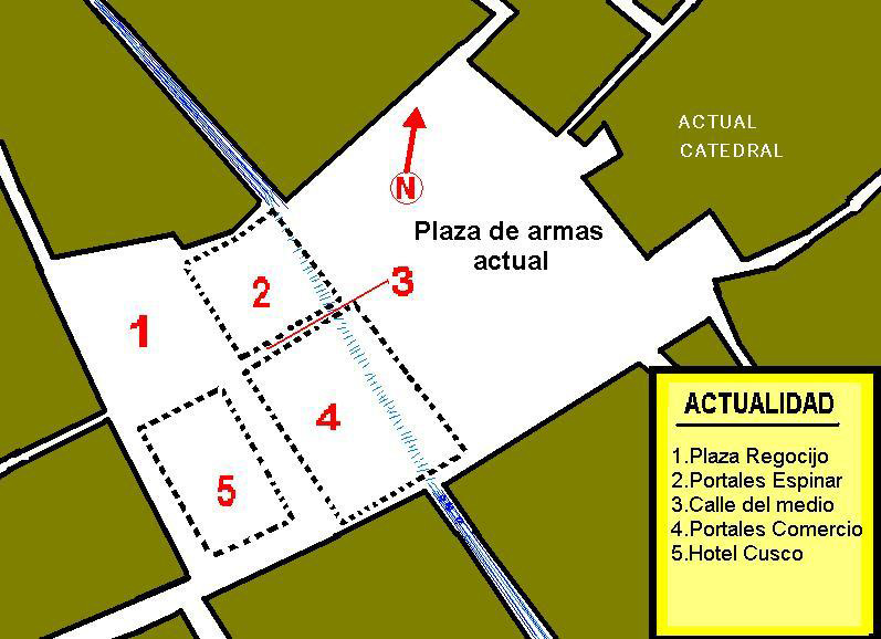 Mapa de la Plaza de armas del Cusco incaico en contraste con la actualidad.